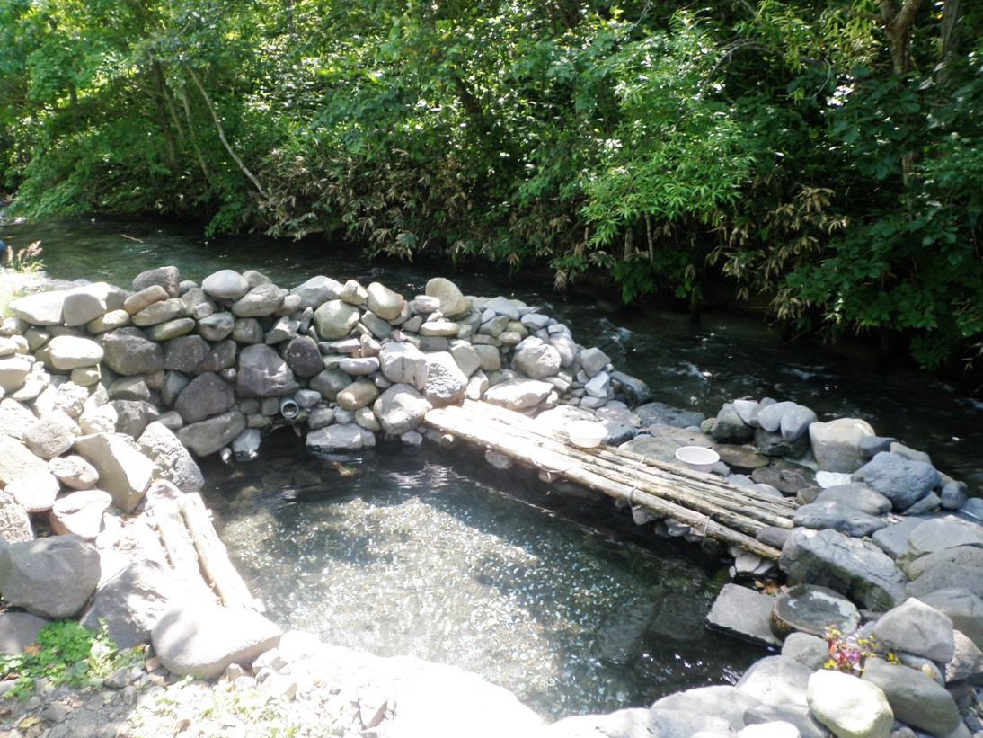 北海道中標津町養老牛温泉の野湯、からまつの湯